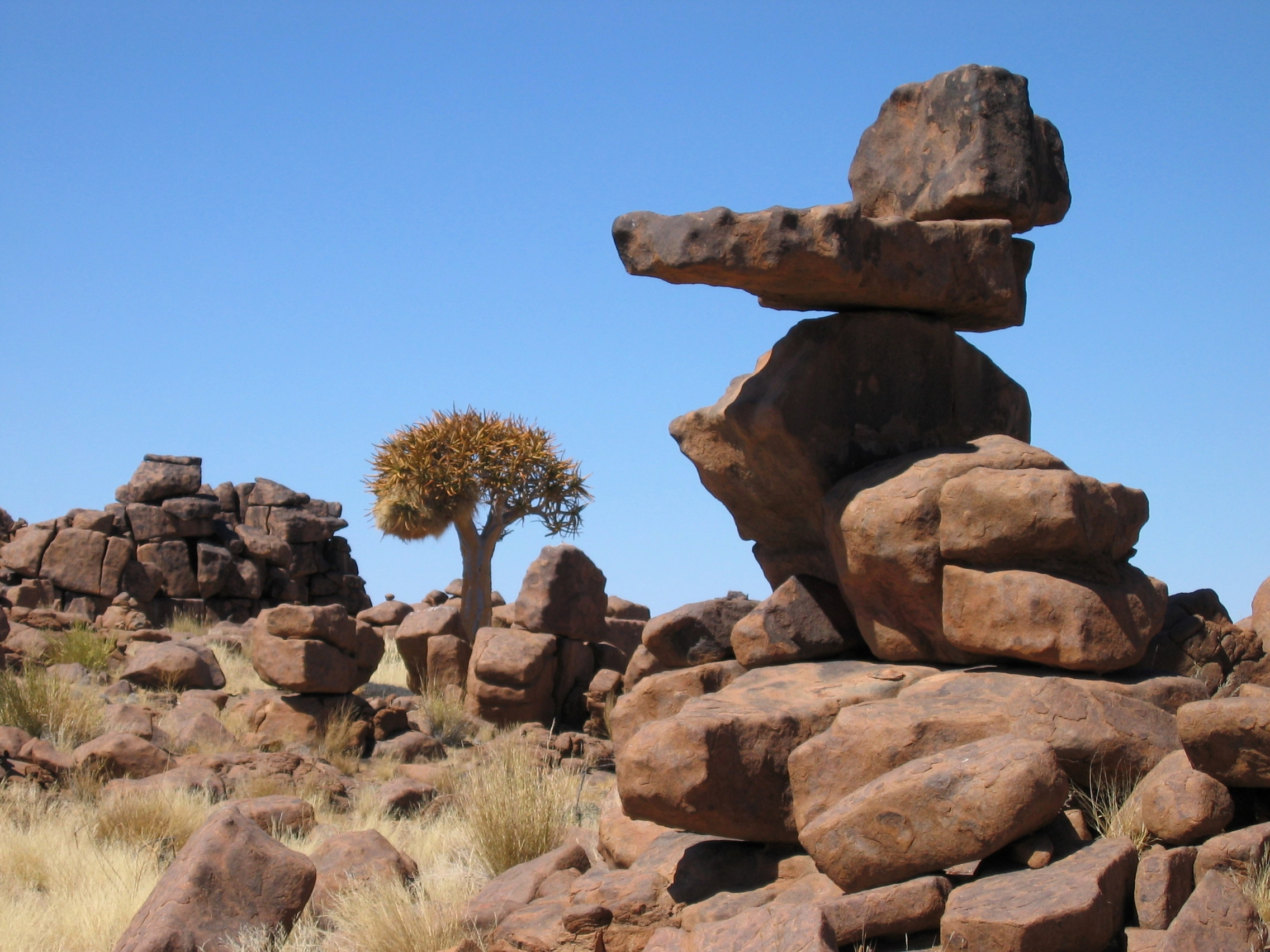 Spielplatz der RiesenGiants Playground